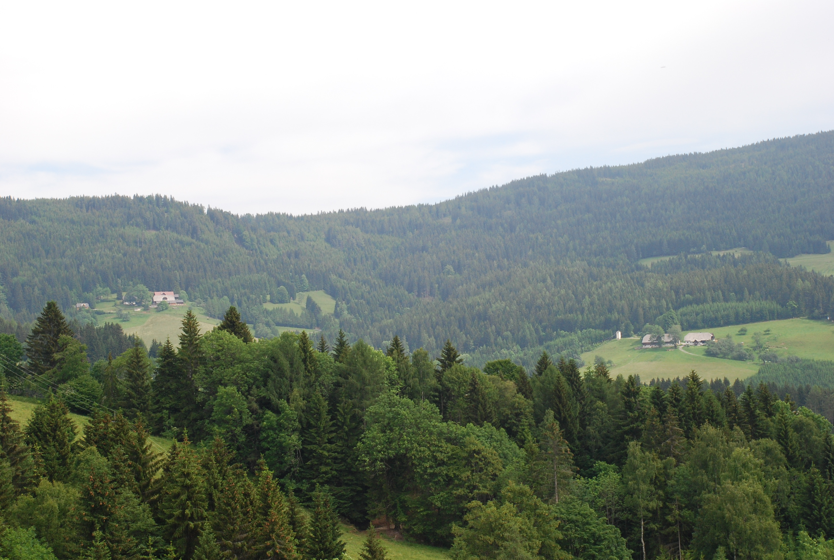 Bauernhöfe im Klosterwinkel